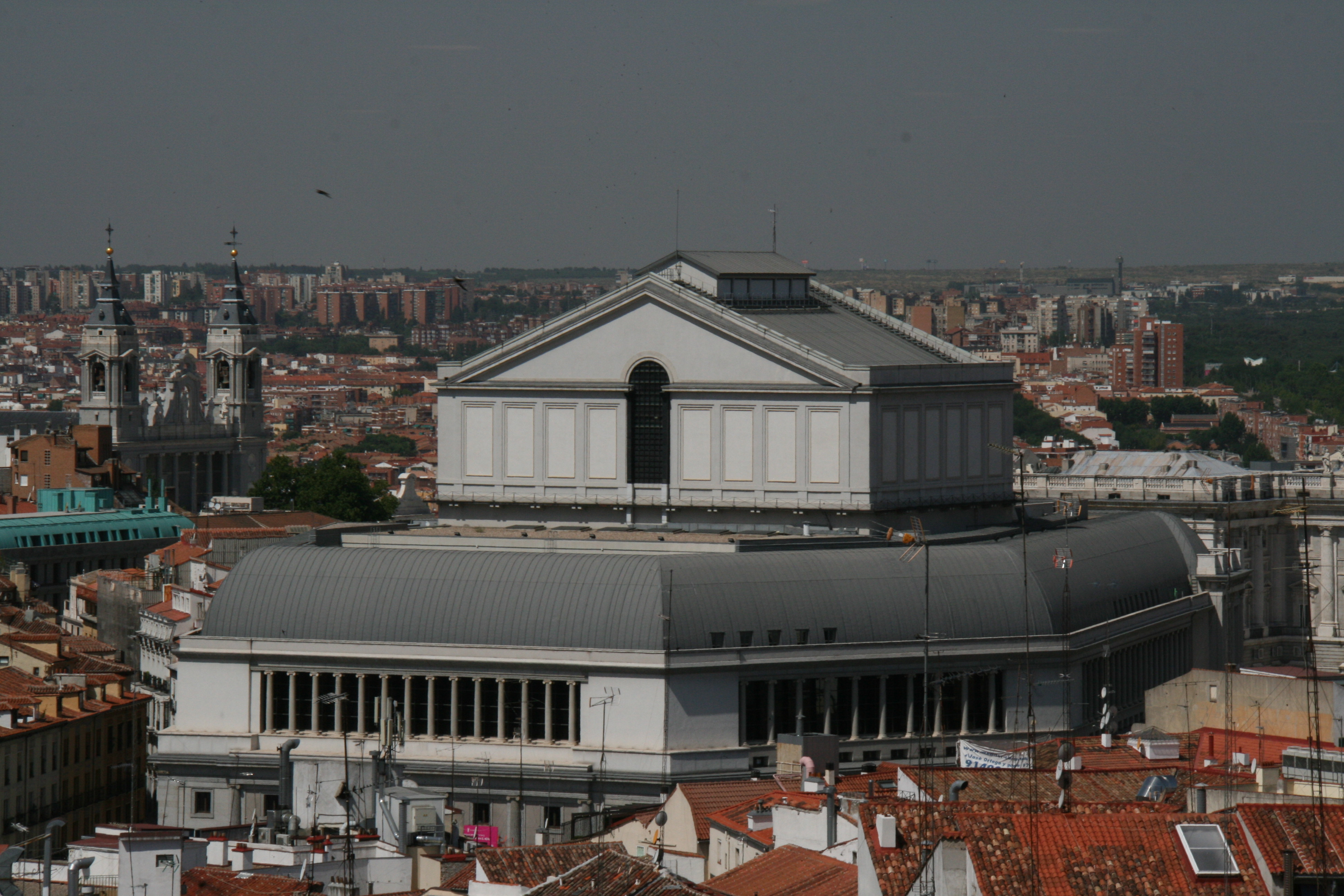 Vista Aérea del Teatro Real